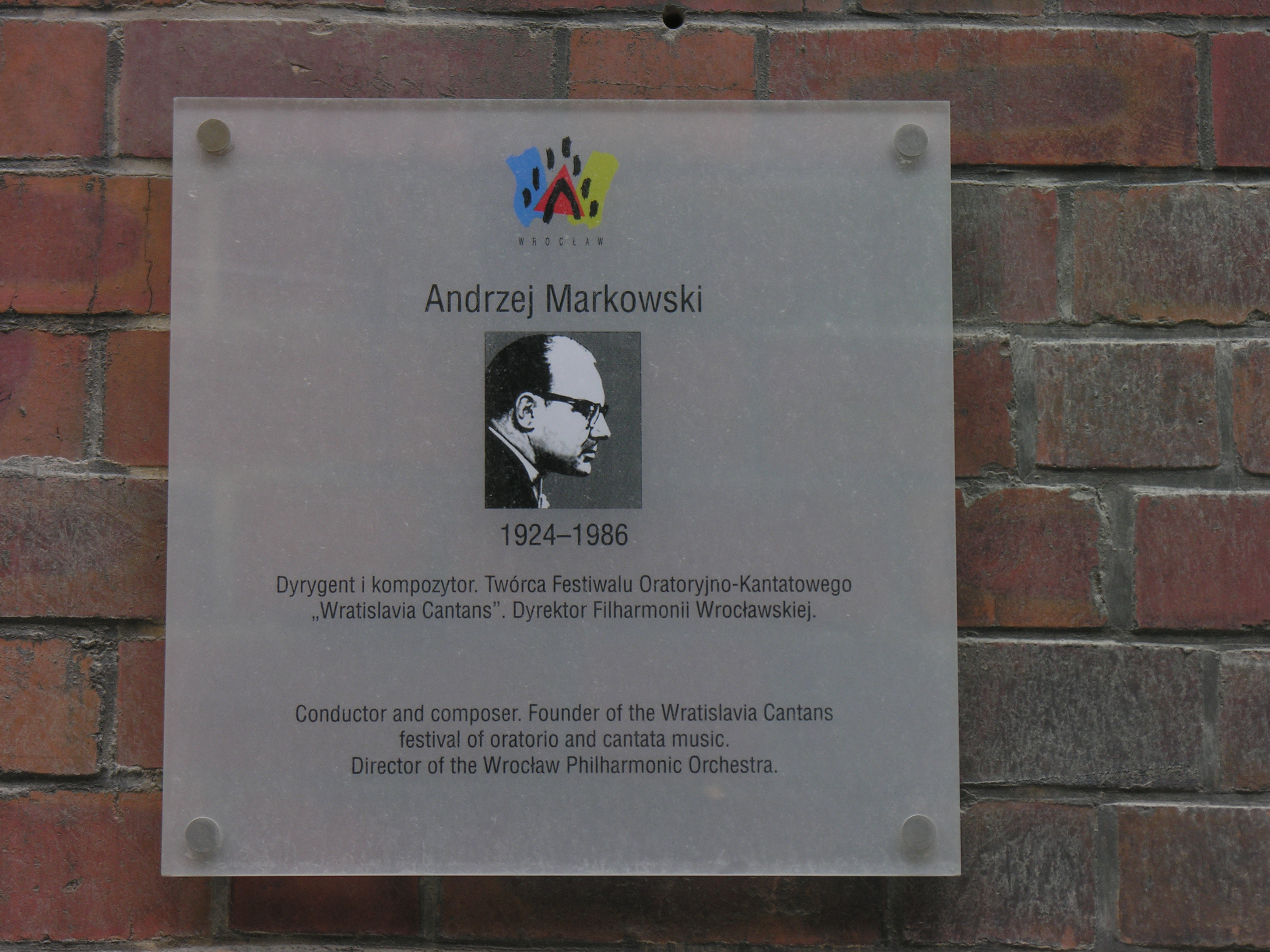 Tablica ku czci Andrzeja Markowskiego na południowej elewacji kościoła św. Marii Magdaleny we Wrocławiu